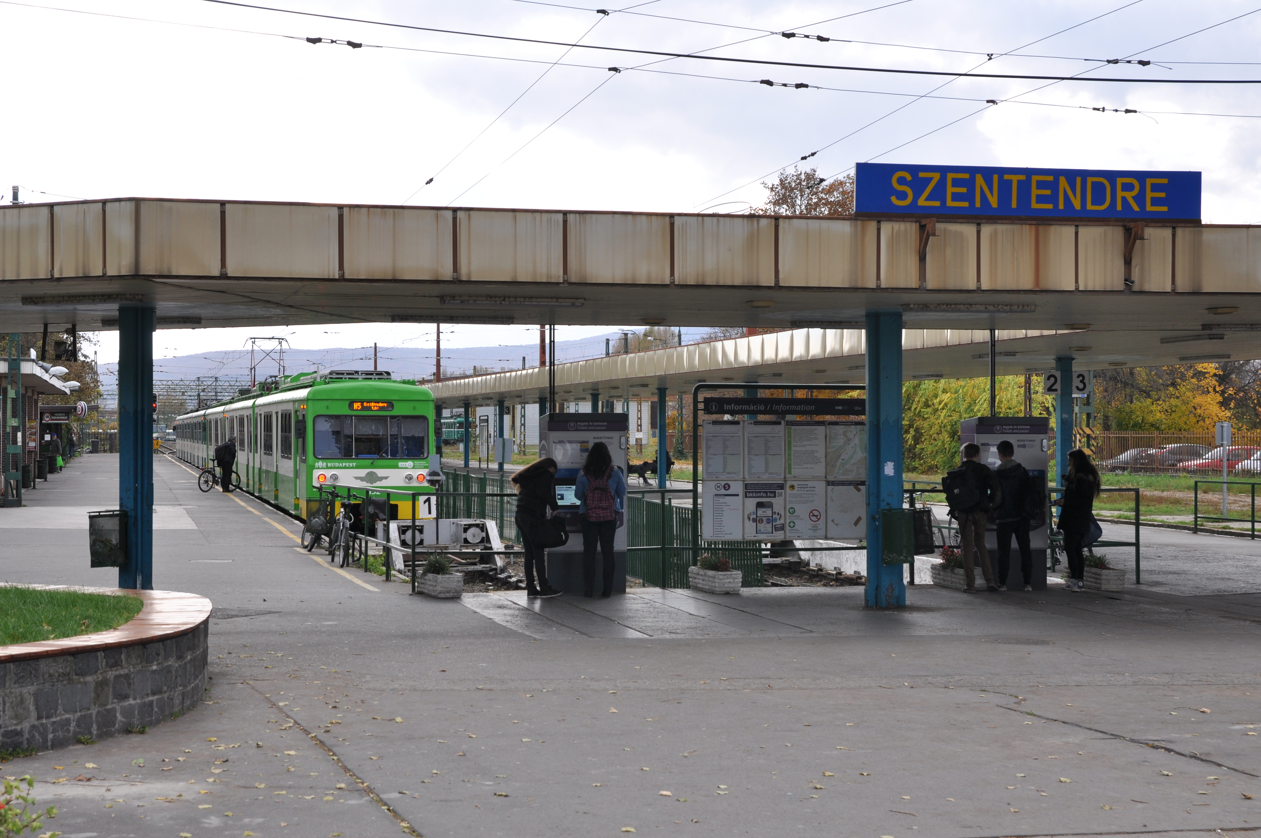 Szentendre, HÉV állomás